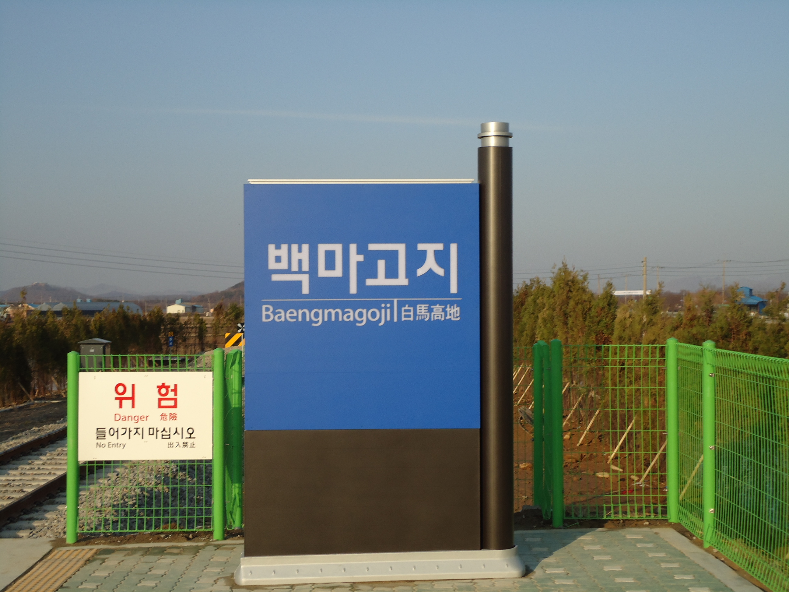 백마고지역 역명판 역명판 너머는 경원선 중단점이 있다.